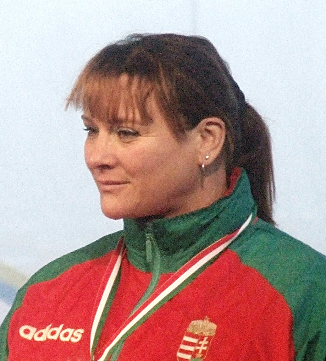 Kőbán Rita a Kincsem Parkban.